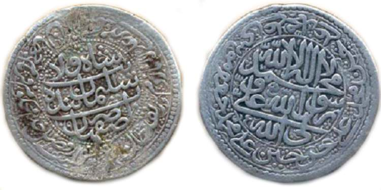 Silber-Münze aus Persien/Iran: 20 Shahi, Isfahan, Safi II. (auch als Sulaiman I. bekannt), 1690